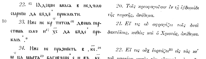 Проклятие (анафема) на тех, кто не крестится двумя перстами. Параллельно: древнерусский текст, переведённый примерно в начале X века и греческий текст: «Иже не крестится двумя перстома яко и Христос, да будет проклят» «Εἴ τις οὐ σφραγίζει τοῖς δυσὶ δακτύλοις, καθὼς καὶ ὁ Χριστός, ἀνάθεμα». Бенешевич, Владимир Николаевич. Древнеславянская кормчая XIV титулов без толкования; Совместное издание академии наук СССР и Болгарской академии наук София, 1987. Т. 2.